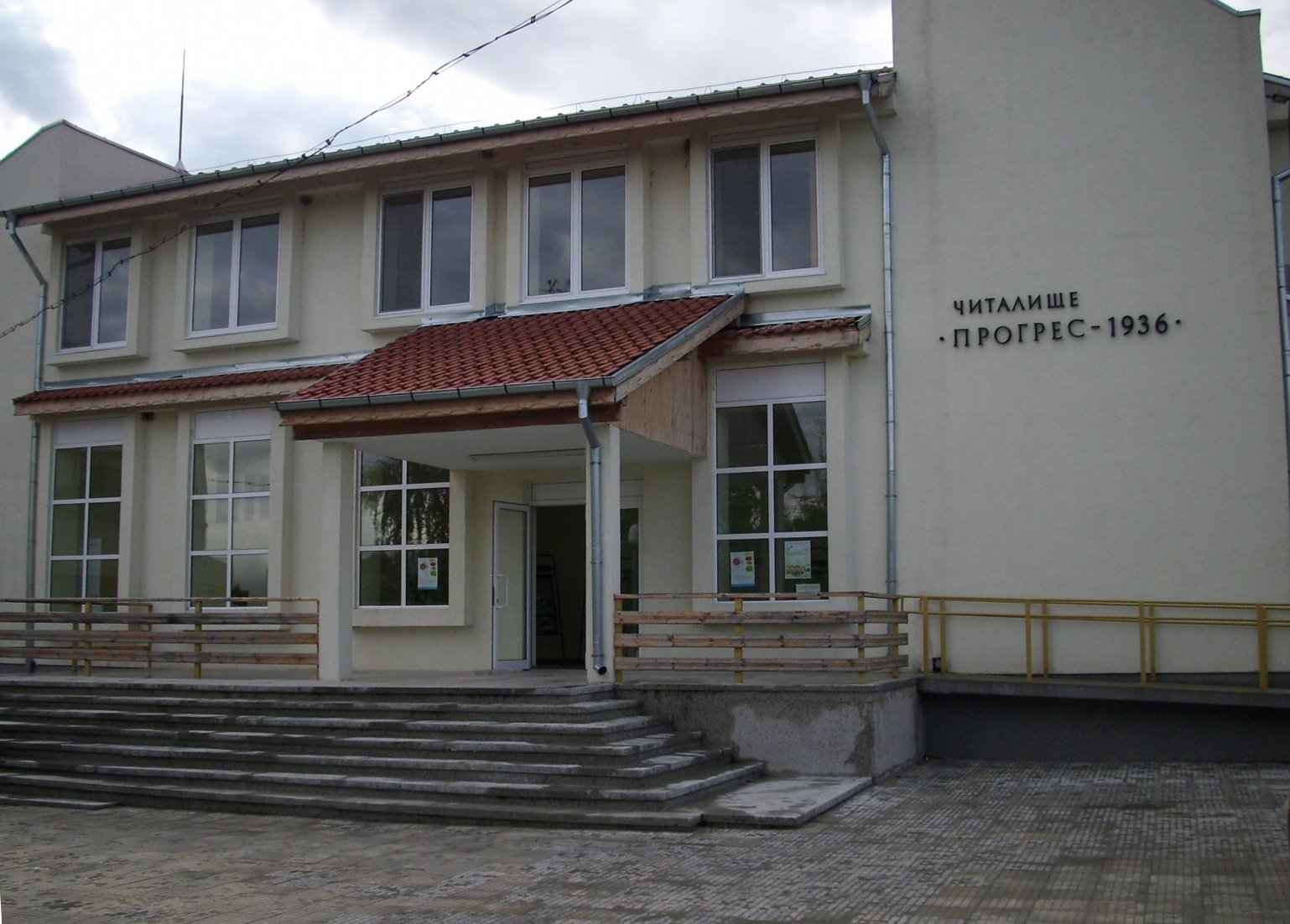 Новата сграда на читалище Прогрес - с. Дражево